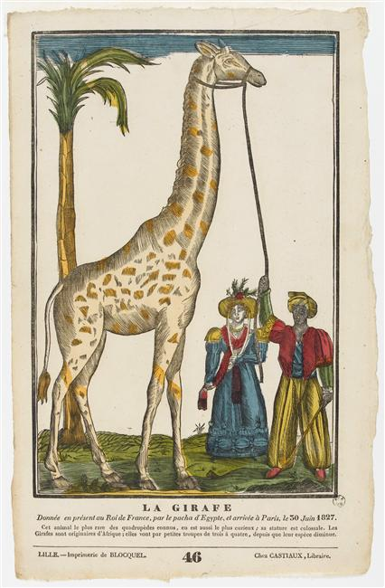 La girafe offerte par le Pacha d'Égypte au roi Charles X